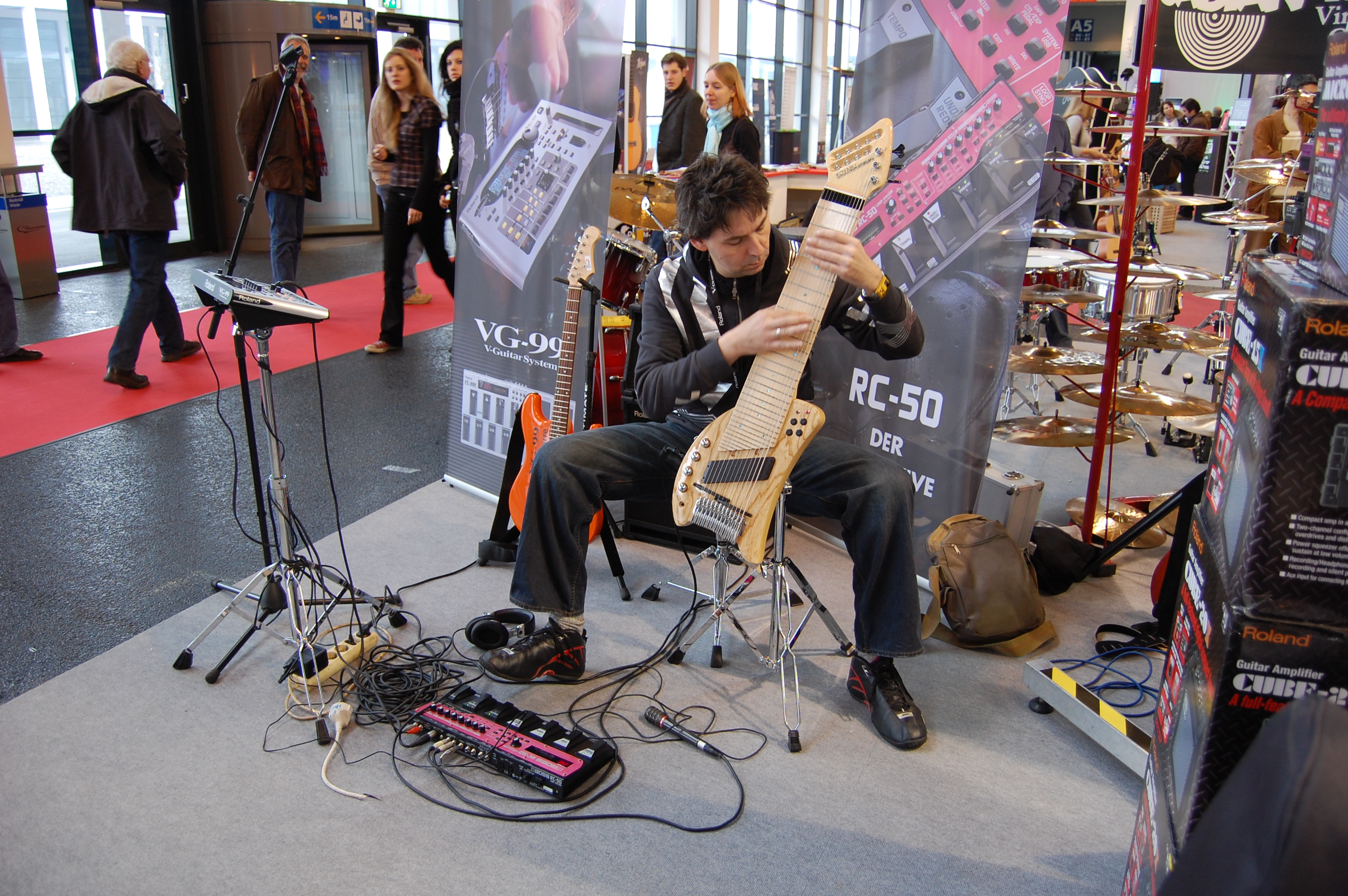 Der Frankfurter Multiinstrumentalist X-Ray-Simon an einem Koyabu Symmetric Board mit integrierten Roland GK Synthesizer Tonabnehmern. Auf der My Music 2008 in Friedrichshafen/Germany.